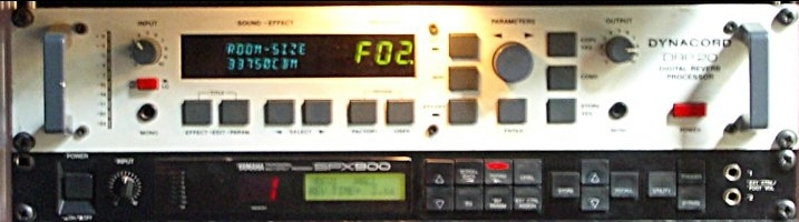 Hallgeraete Dynacord DRP 20 Digital Reverb Processor (1989) Yamaha SPX900 Digital Multi Effects Processor (1988)